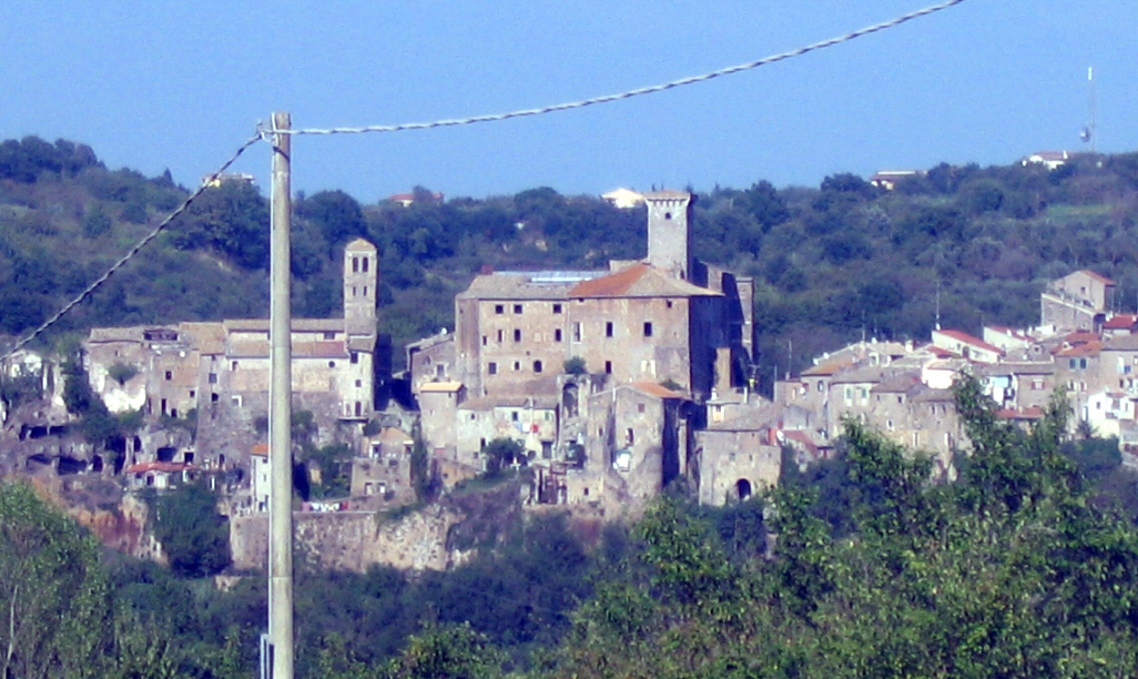 Faleria, Lazio, Italia